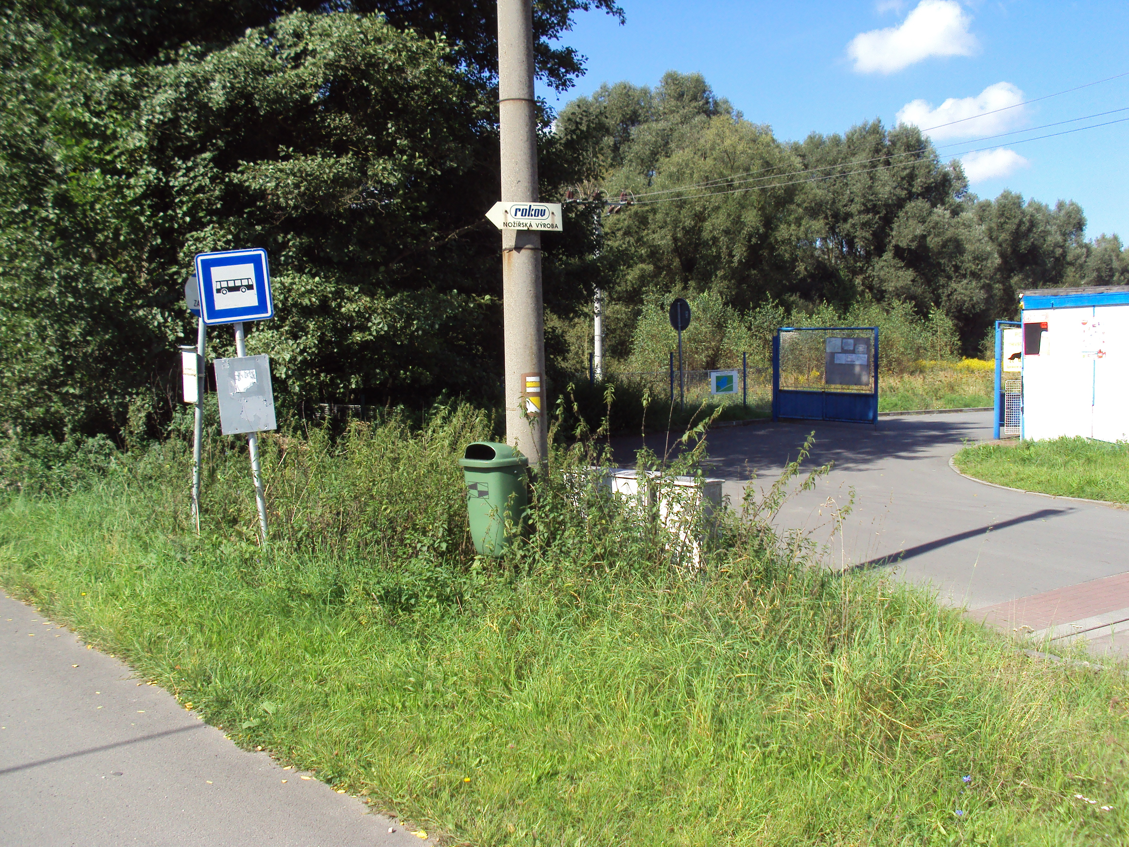 Autobusová zastávka na konci českolipské Dubice, kde začínala osada Robeč